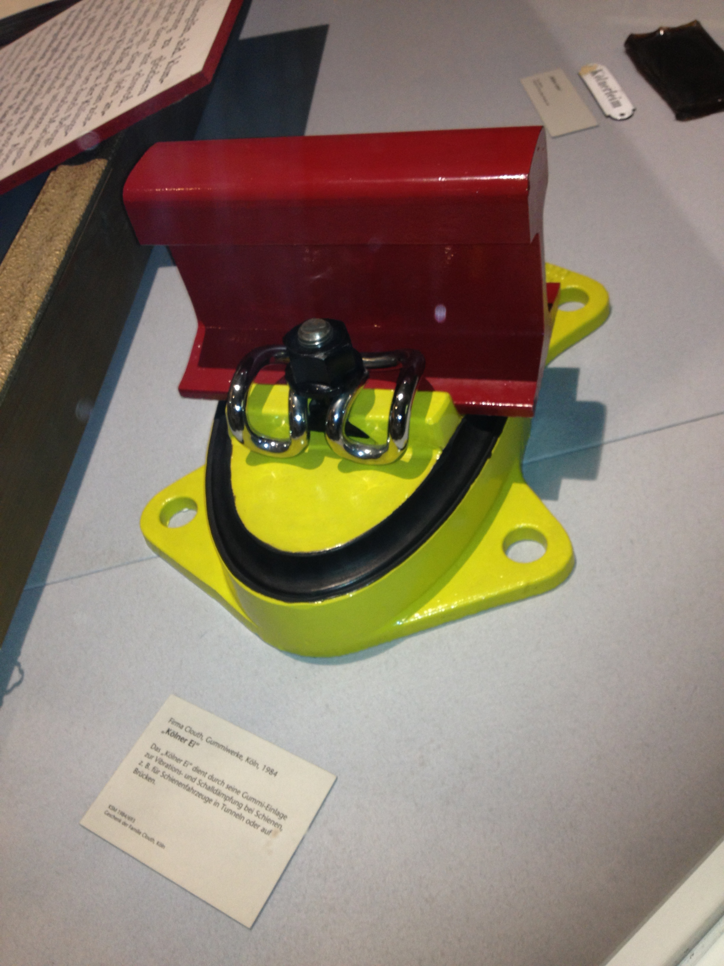 Ein Kölner Ei der Clouth Gummiwerke, aufgenommen im Kölnischen Stadtmuseum. Originalteile wurden nicht lackiert. Dieses Teil wurde speziell für das Kölner Stadtmuseum angefertigt und zur besseren Verständlichkeit farbig lackiert: In gelb - unteres und oberes Metallteil, dazwischen in schwarz der Gummipuffer, in rot die Schiene die mit einer schwarzen Klammer am „Ei“ befestigt ist.